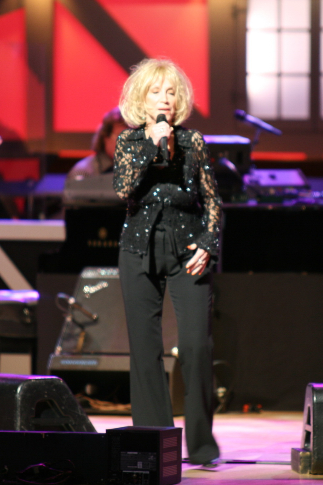 Jeannie Seely